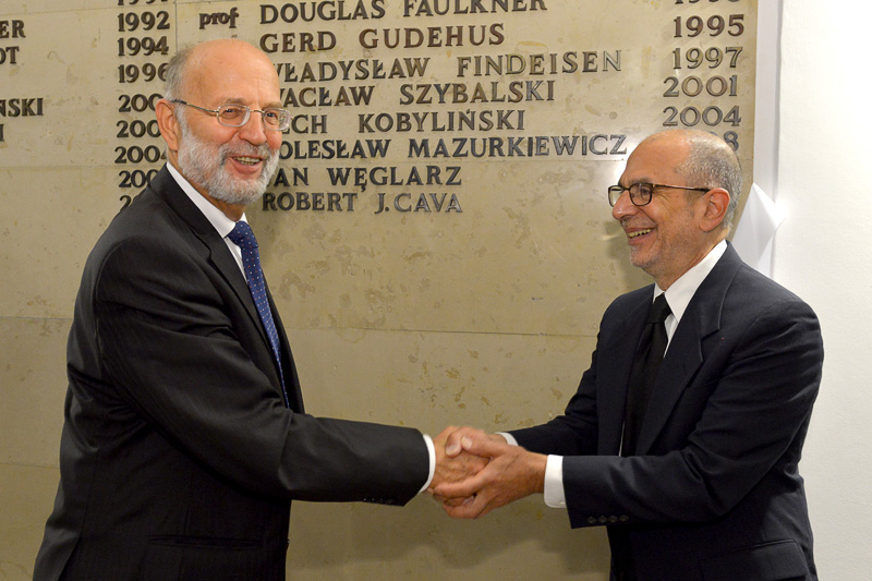 Prof. Henryk Krawczyk (Politechnika Gdańska) i prof. Robert J. Cava z USA.